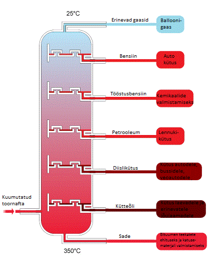 Nafta destilleerimisel saadavad produktid